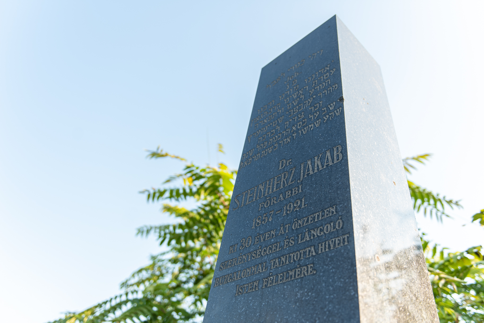 Steinherz Jakab, Dr - síremléke